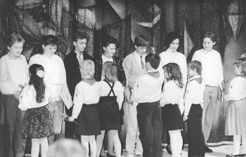 Berlin, Jugendweihe, Feierstunde ADN-ZB Roeske 25.3.89 Berlin: Jugendweihe. Einen besonderen Tag erlebten am Sonnabend mehr als 40 Lichtenberger Mädchen und Jungen im Haus der sowjetischen Wissenschaften und Kultur. Sie erhielten als erste von in diesem Jahr 12.000 Berliner Schülern die Jugendweihe. Bis zum 28. Mai erhalten in der DDR 168.000 Schüler ihre Jugendweihe.